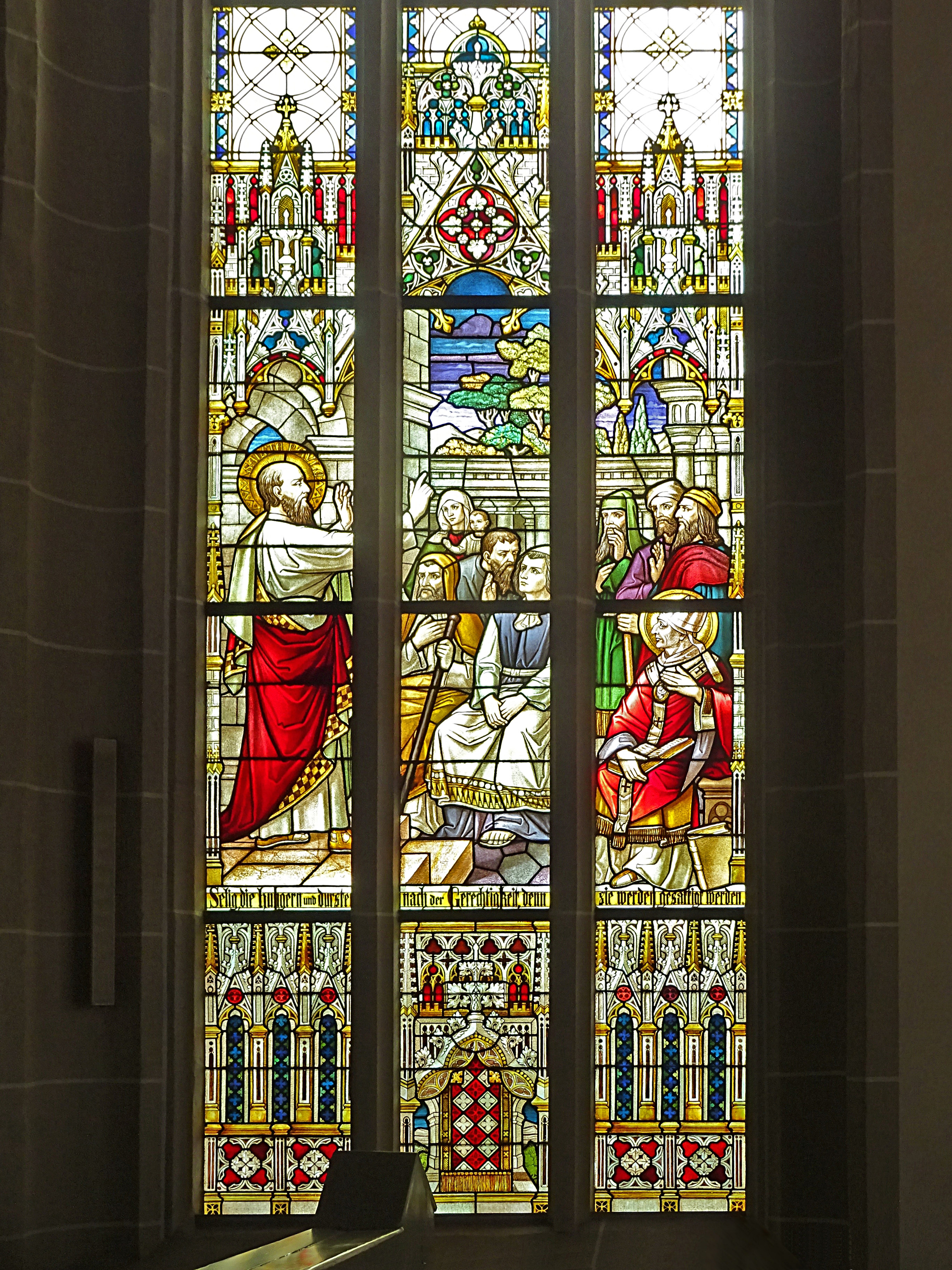 Buntglasfenster in der Pfarrkirche St. Gertrud (Dingelstädt) 4. Selig, die hungern und dürsten nach der Gerechtigkeit, denn sie werden satt sein / Paulus predigt auf dem Areopag in Athen